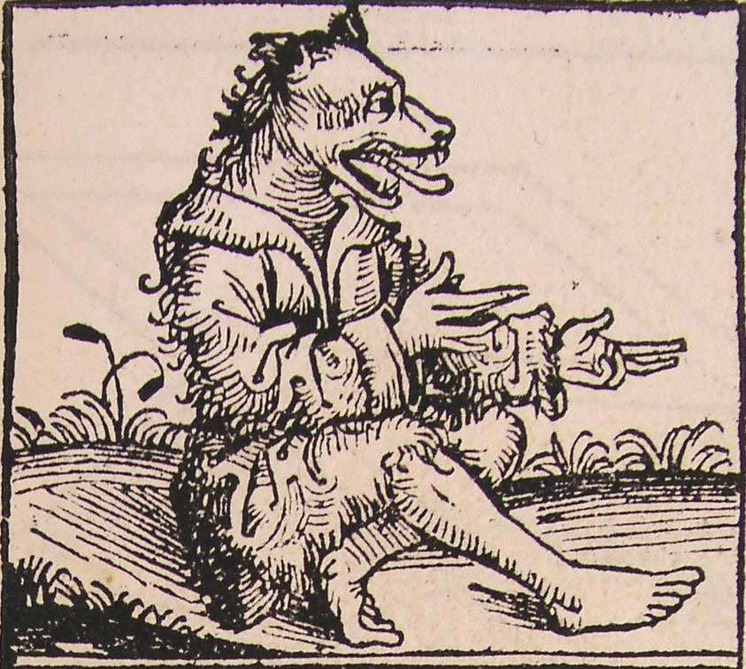 Man with a dog head.